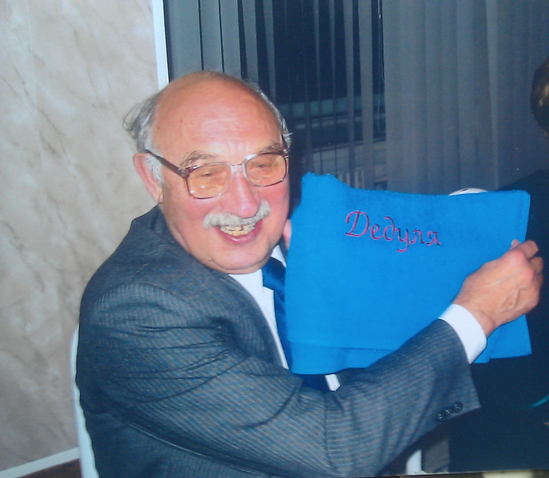 Дедуля